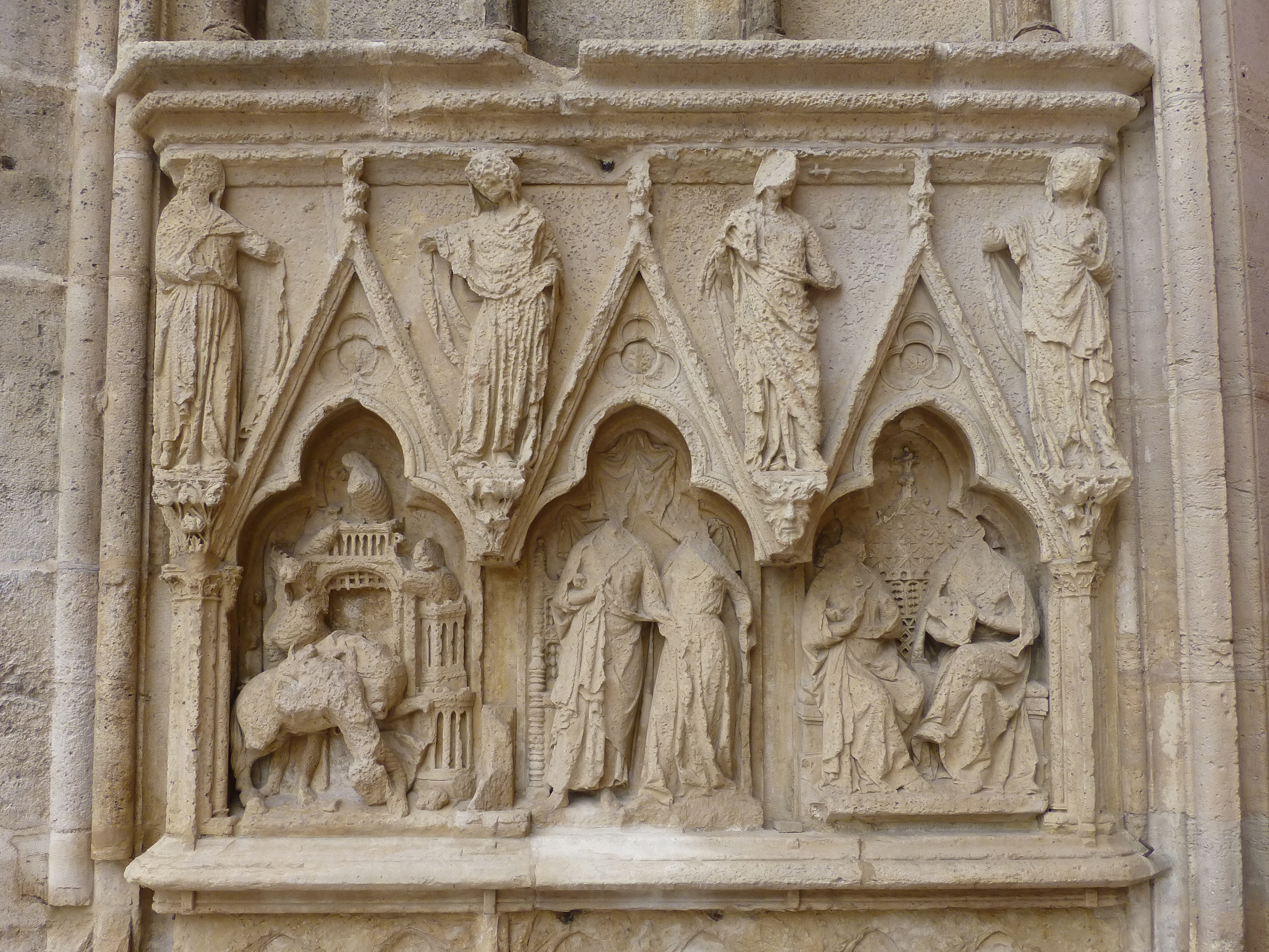 Sculptures situées sur le portail sud de la cathédrale Saint-Étienne d'Auxerre, représentant quatre des huit femmes qui symbolisent les huit enseignements dispensés à l'université au Moyen Âge.